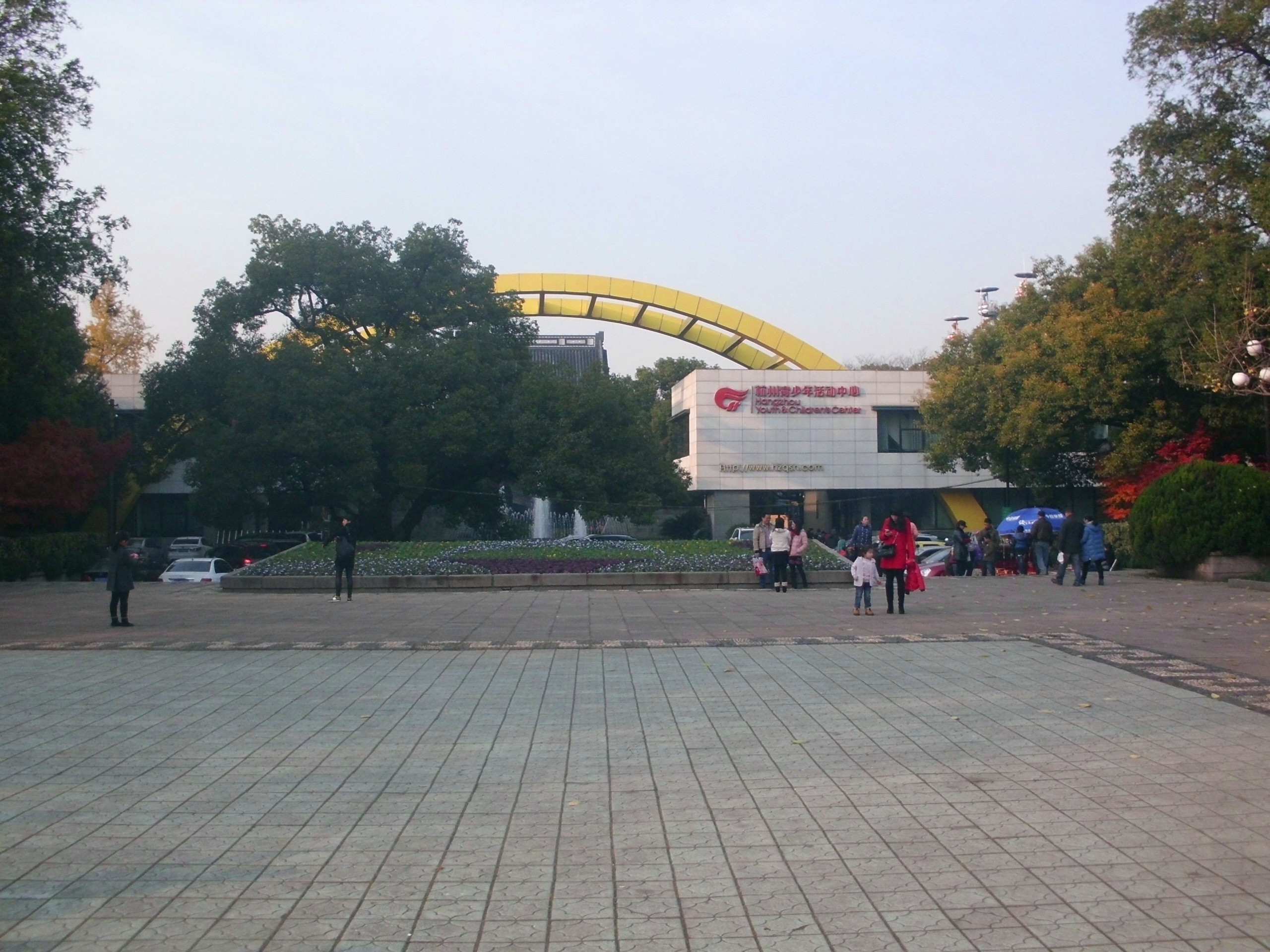 少年宫南大门